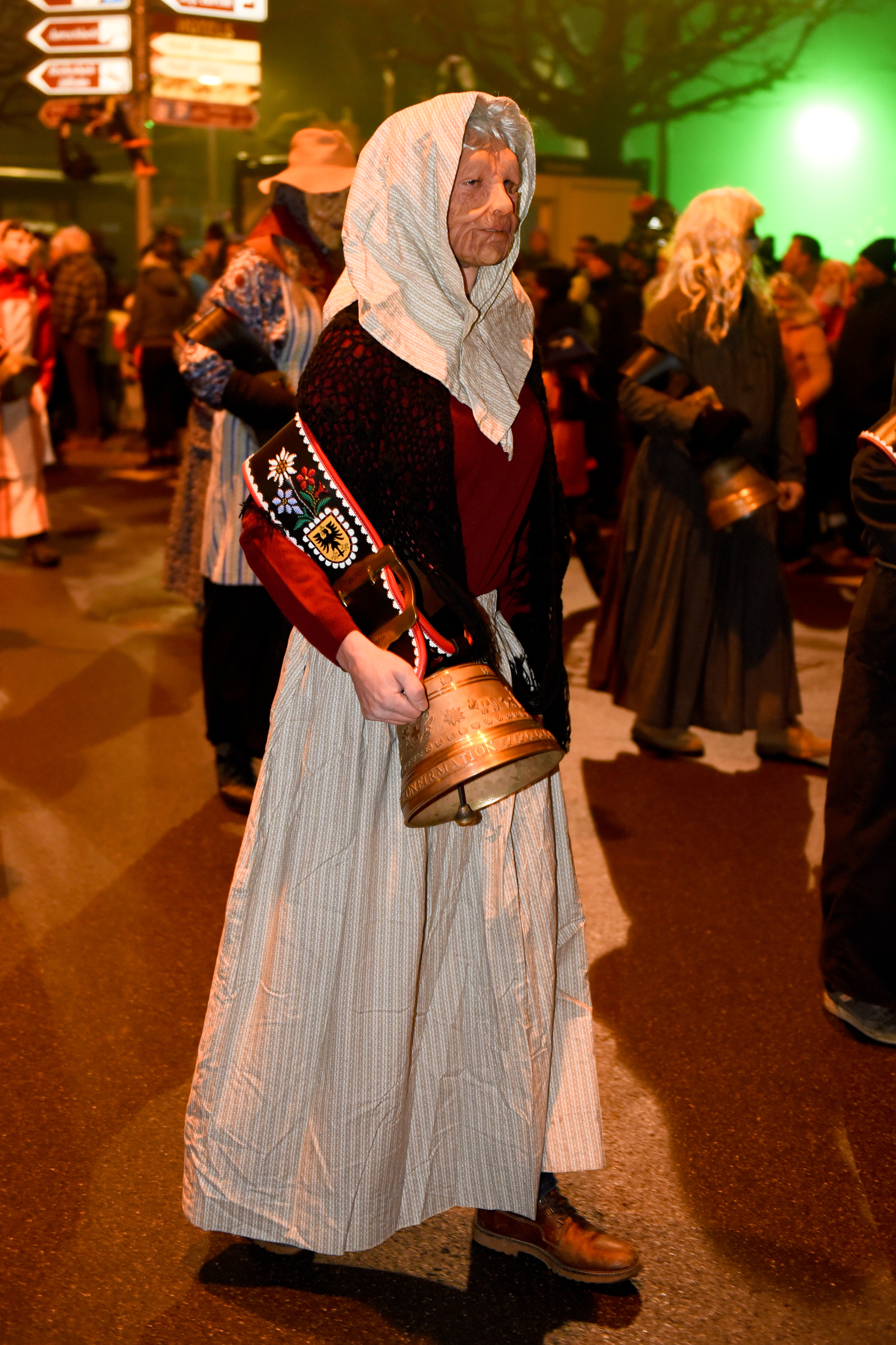 Foto by Theo van Dommelen